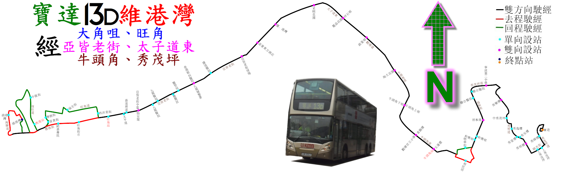 中文（香港）: 九巴13D線的走線圖